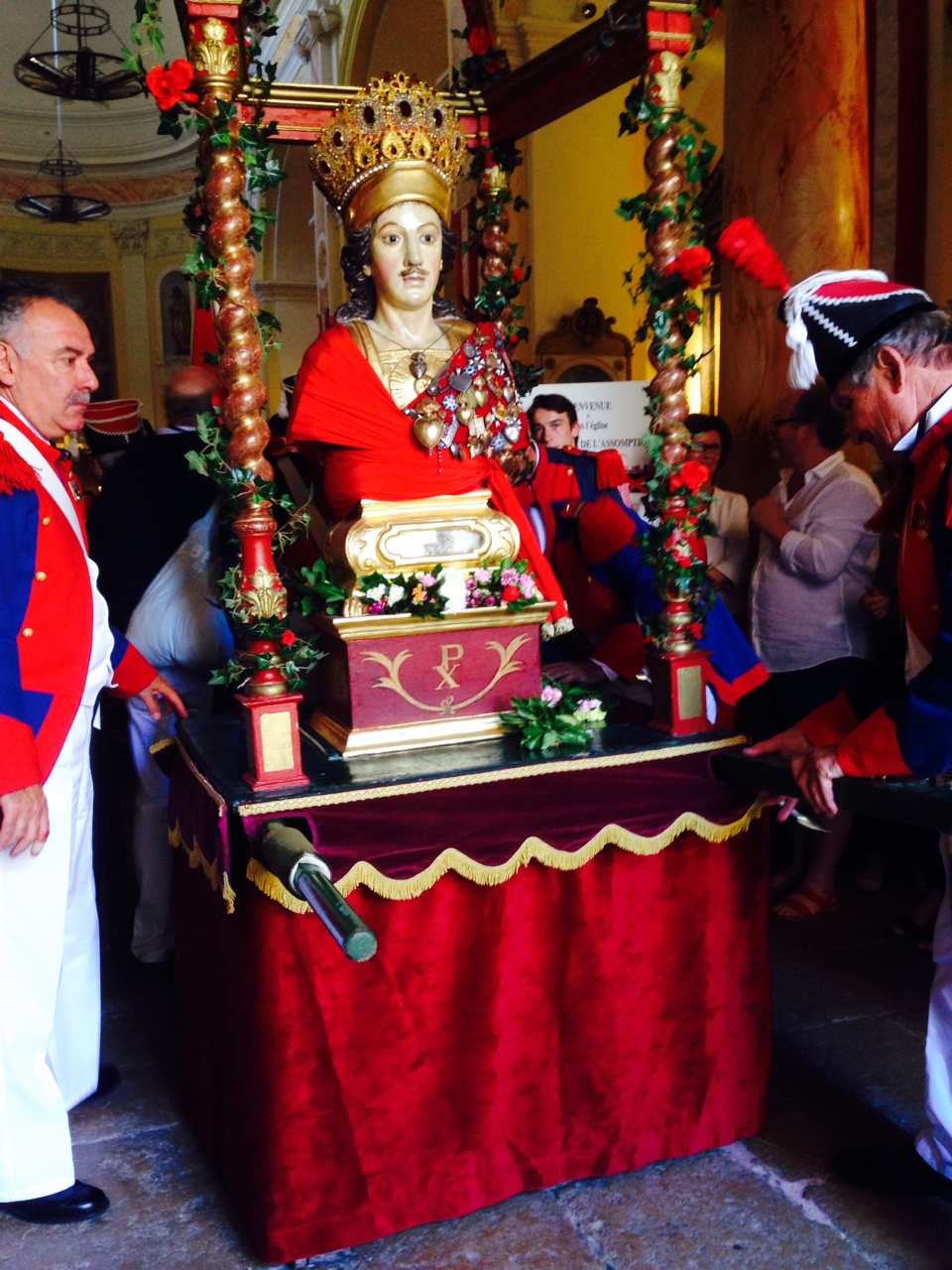 Bavades de Saint Tropez 2015